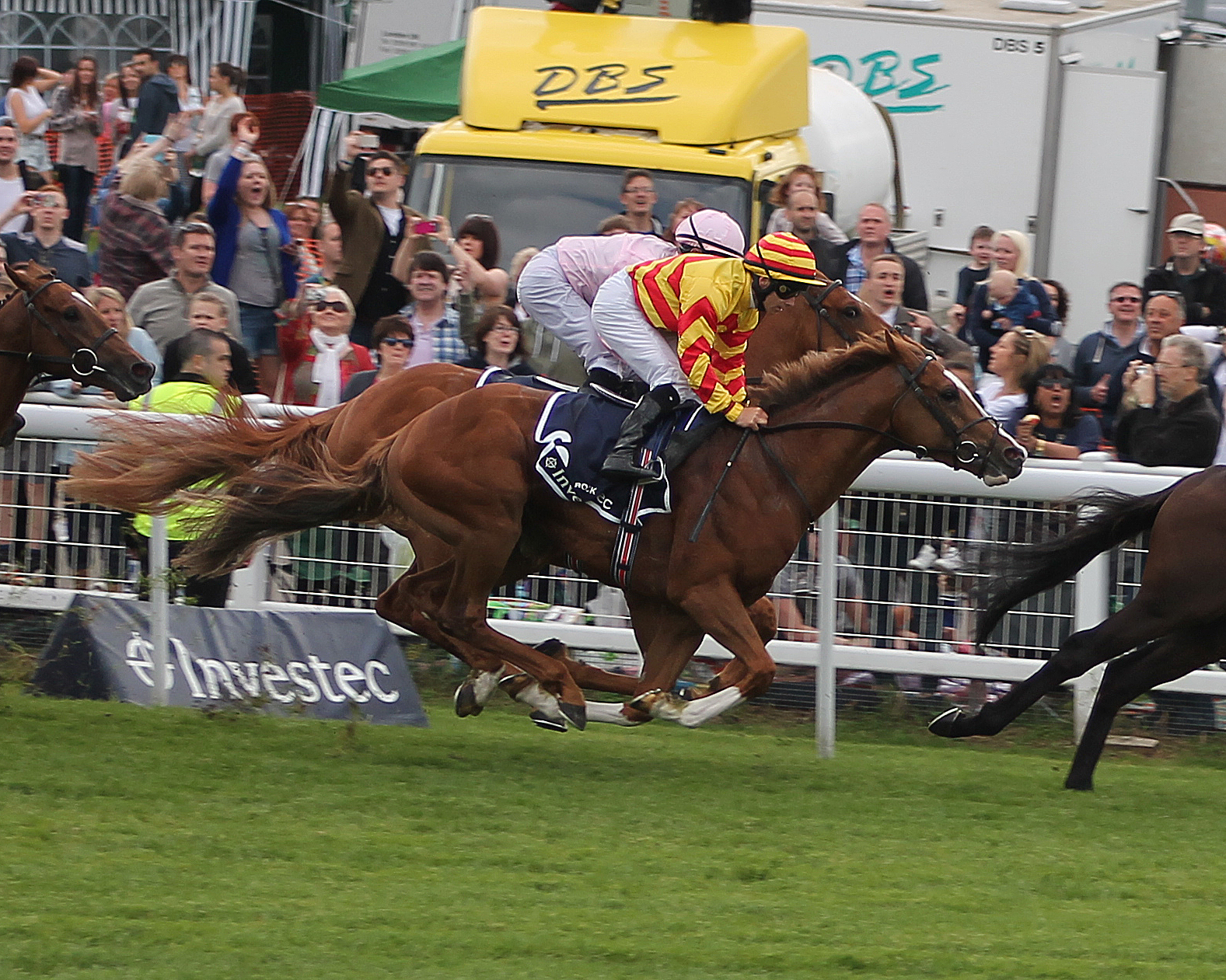 2013 Epsom Derby.